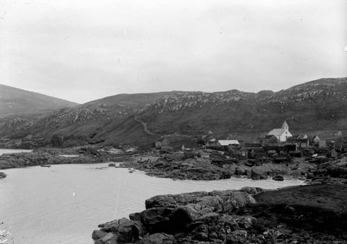 Skopun, Faroe Islands